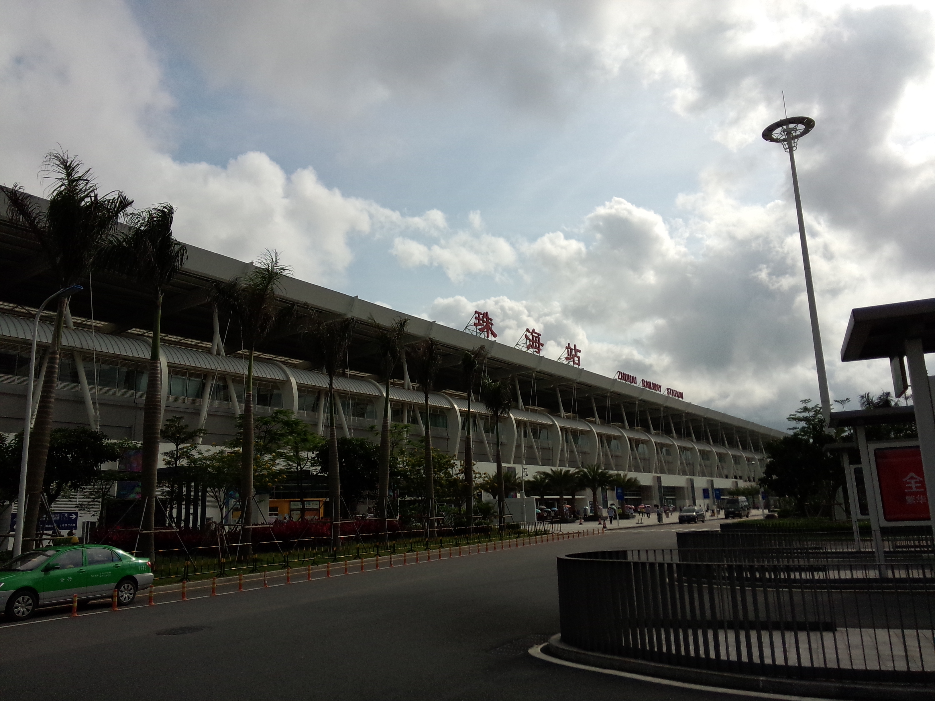 中文（香港）: 中華人民共和國廣東省珠海市，城軌珠海站